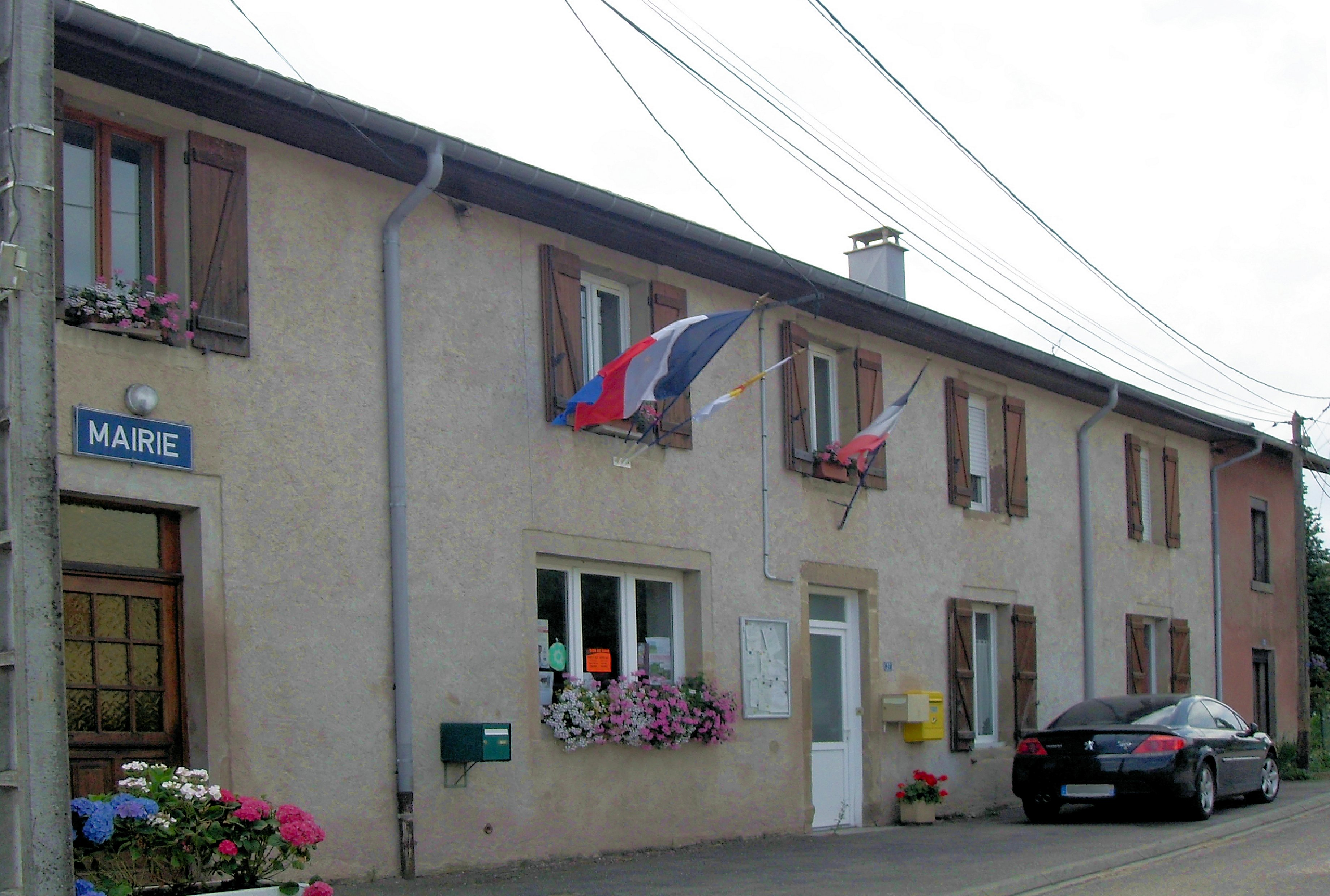 La mairie de Madegney